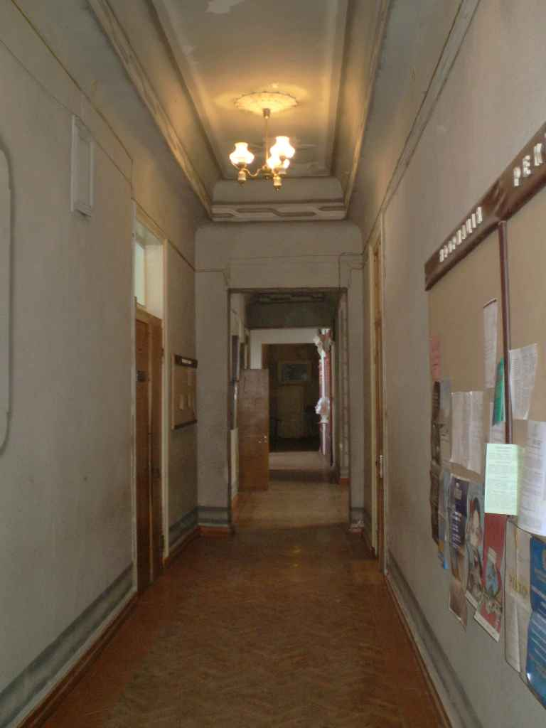 Conservatoire in Donetsk, interier